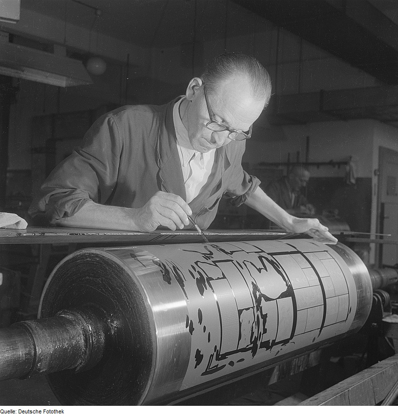 Original image description from the Deutsche Fotothek Typoart. Tiefdruckätzer bei der Abdeckarbeit am Kupferzylinder